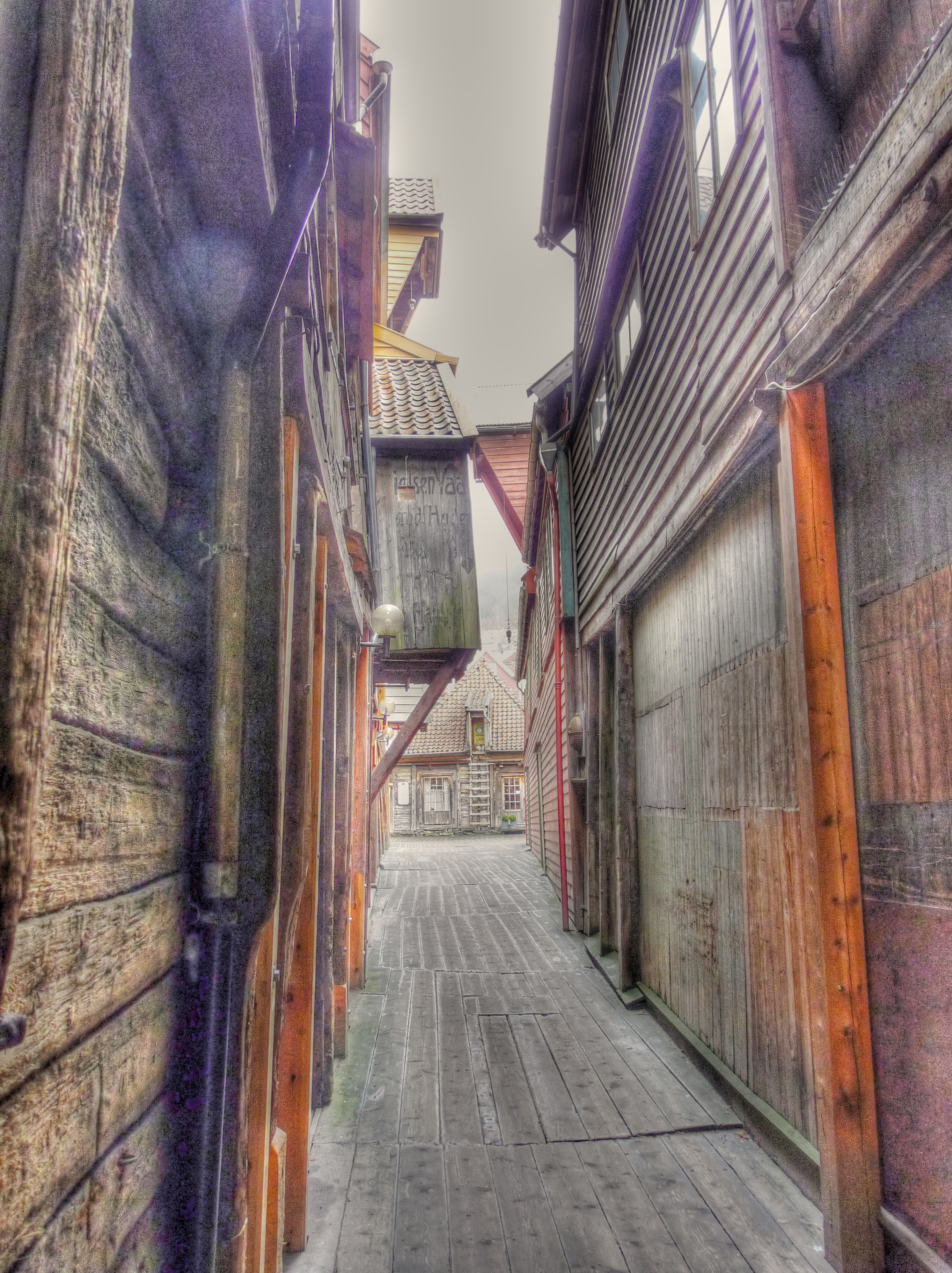 Bryggen HDR